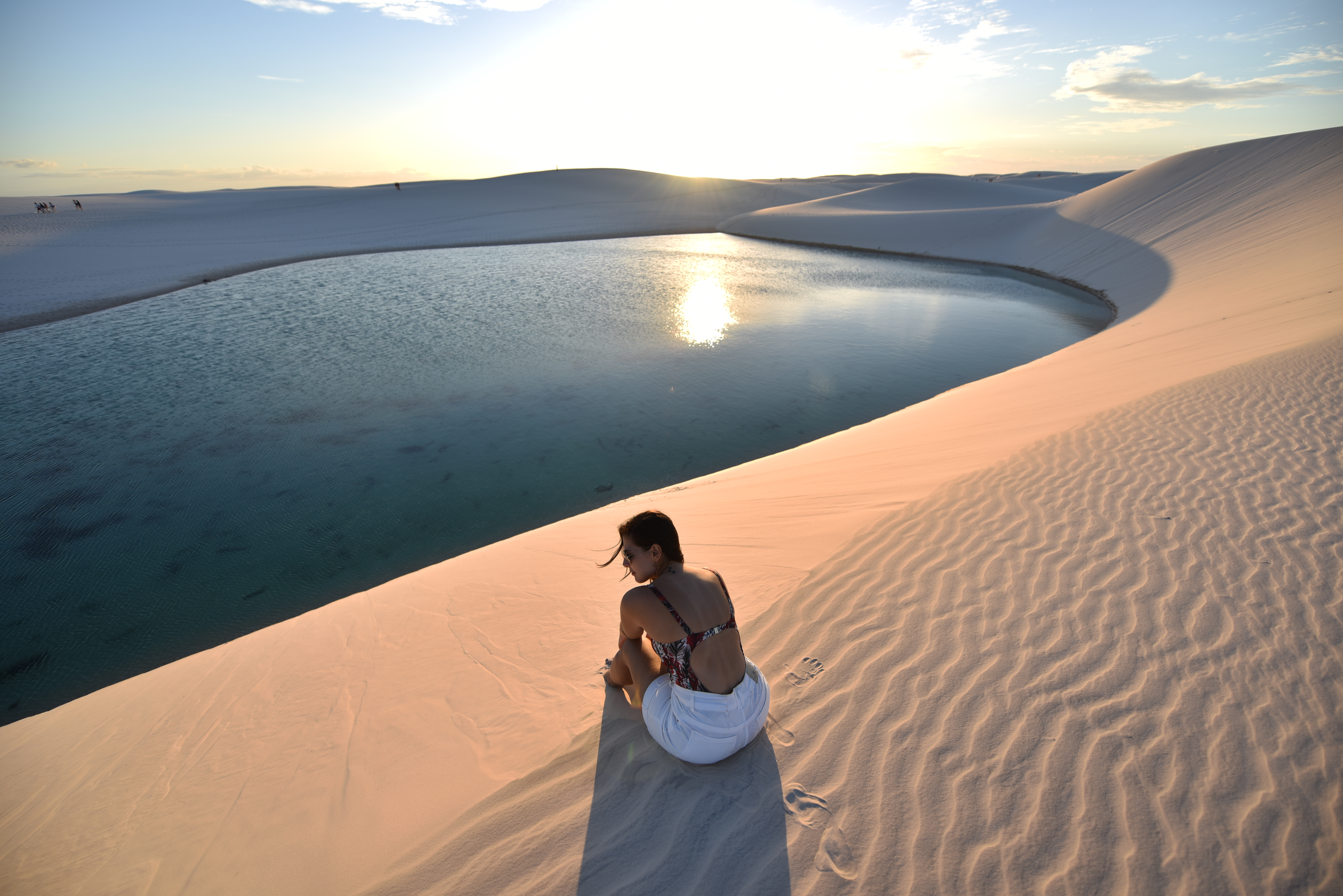 Travel